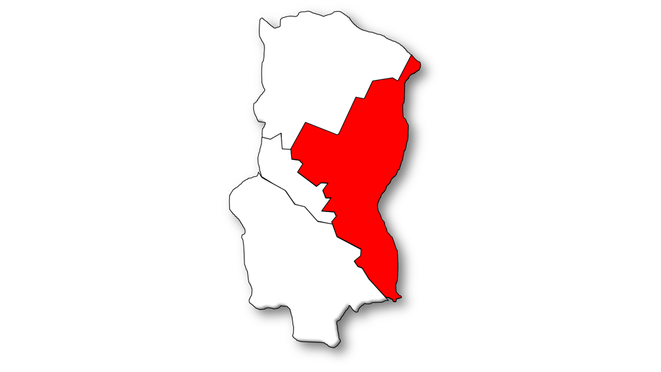 Evolução da População